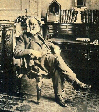 Bernhard Maximilian Lersch in seinen letzten Lebensjahren in seinem Arbeitszimmer